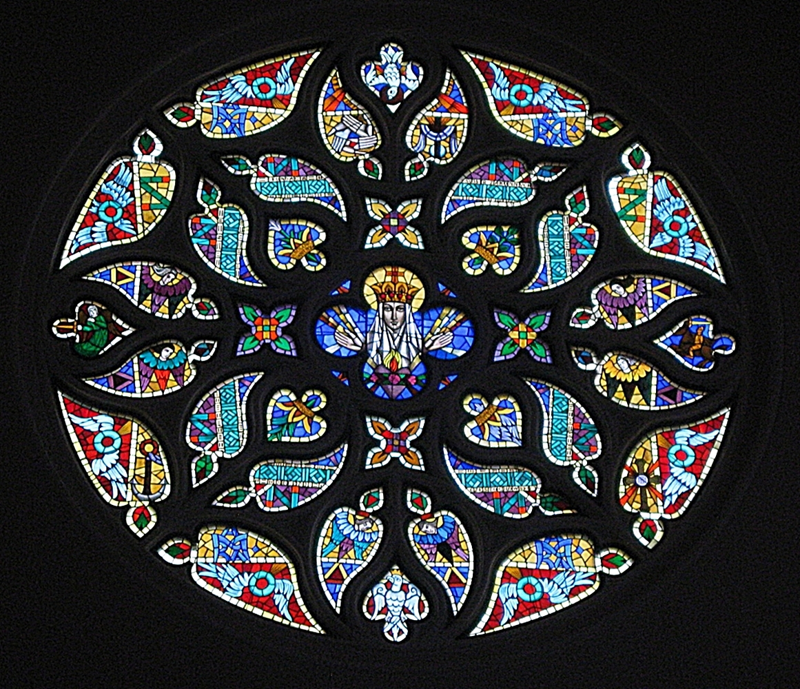 Częstochowa - bazylika katedralna św. rodziny, witraż w transepcie